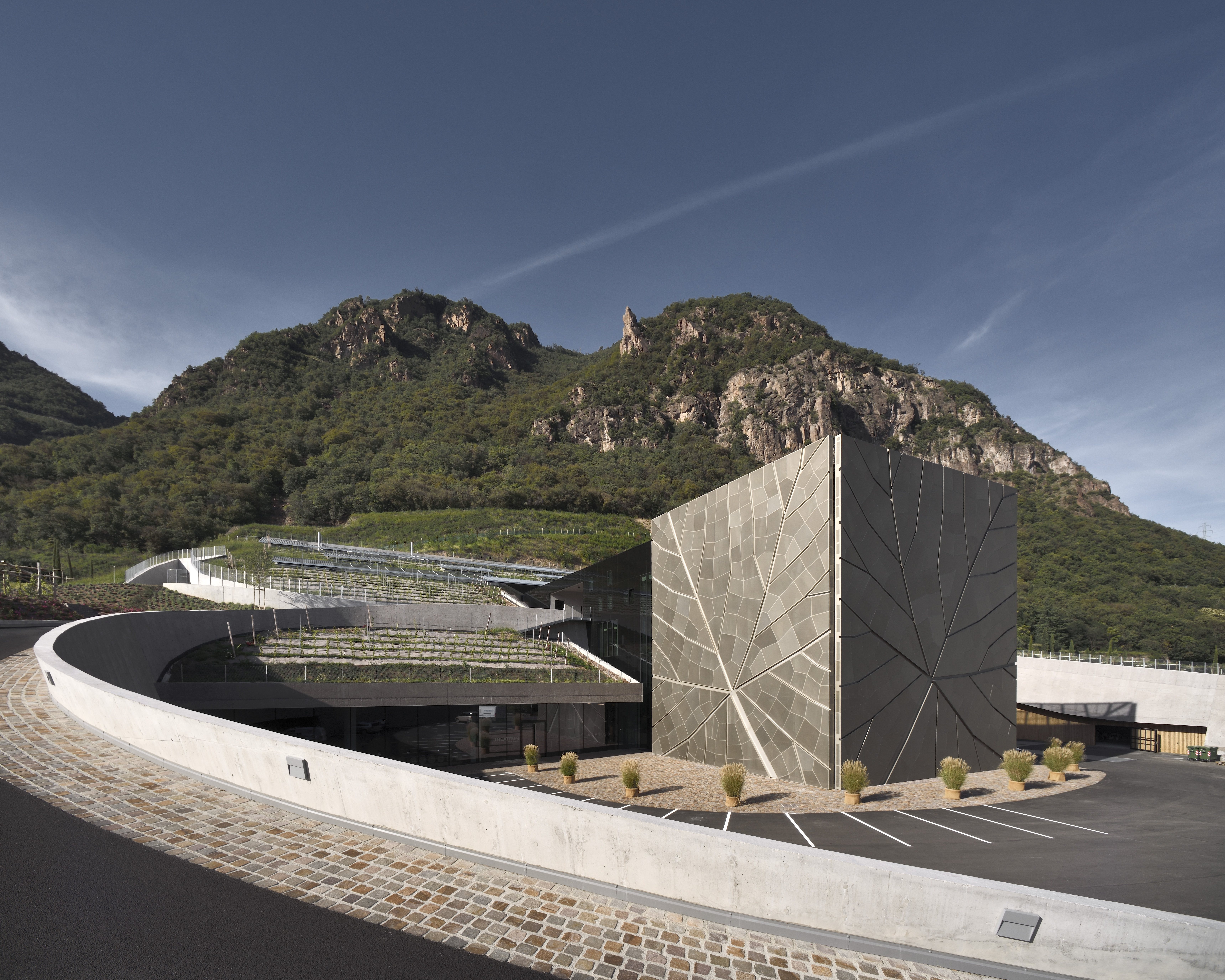 Bild des Neubaus der Kellerei in Bozen, Moritzing